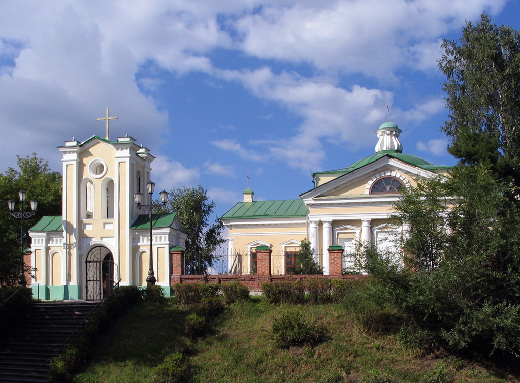 Польский костёл в г. Томске